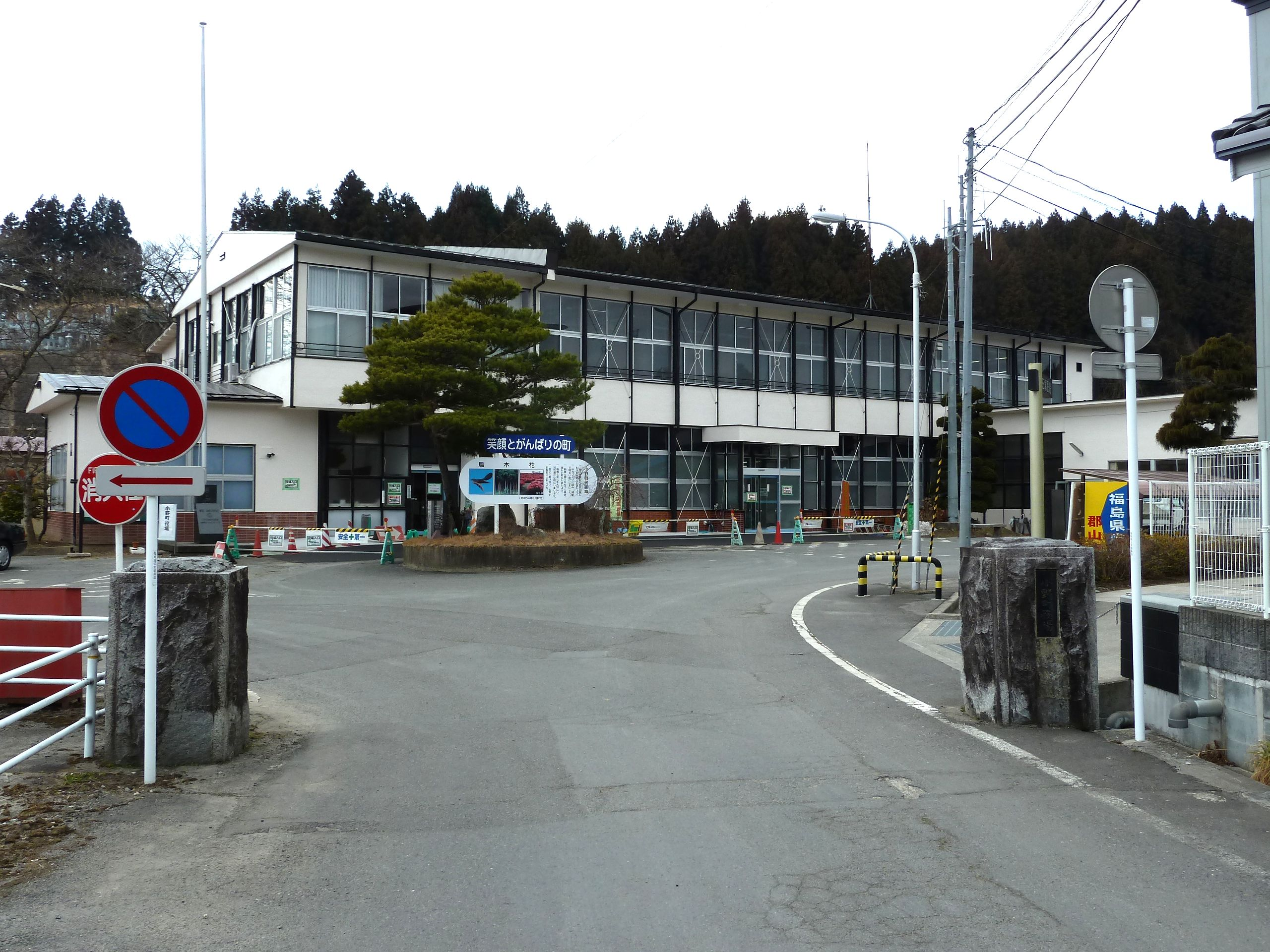 小野町役場